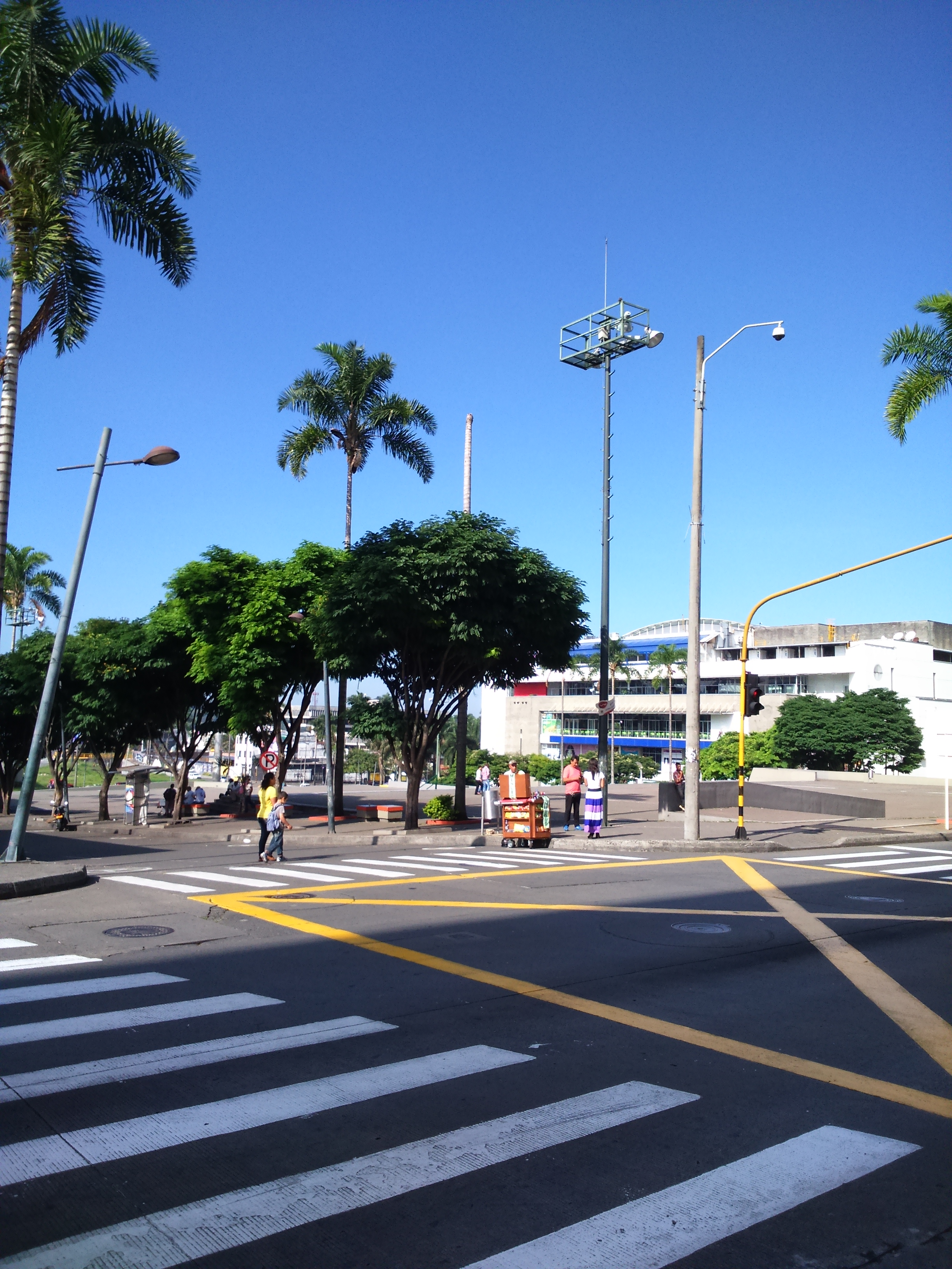 Imagen de la plaza cívica Ciudad Victoria en Pereira, Colombia.